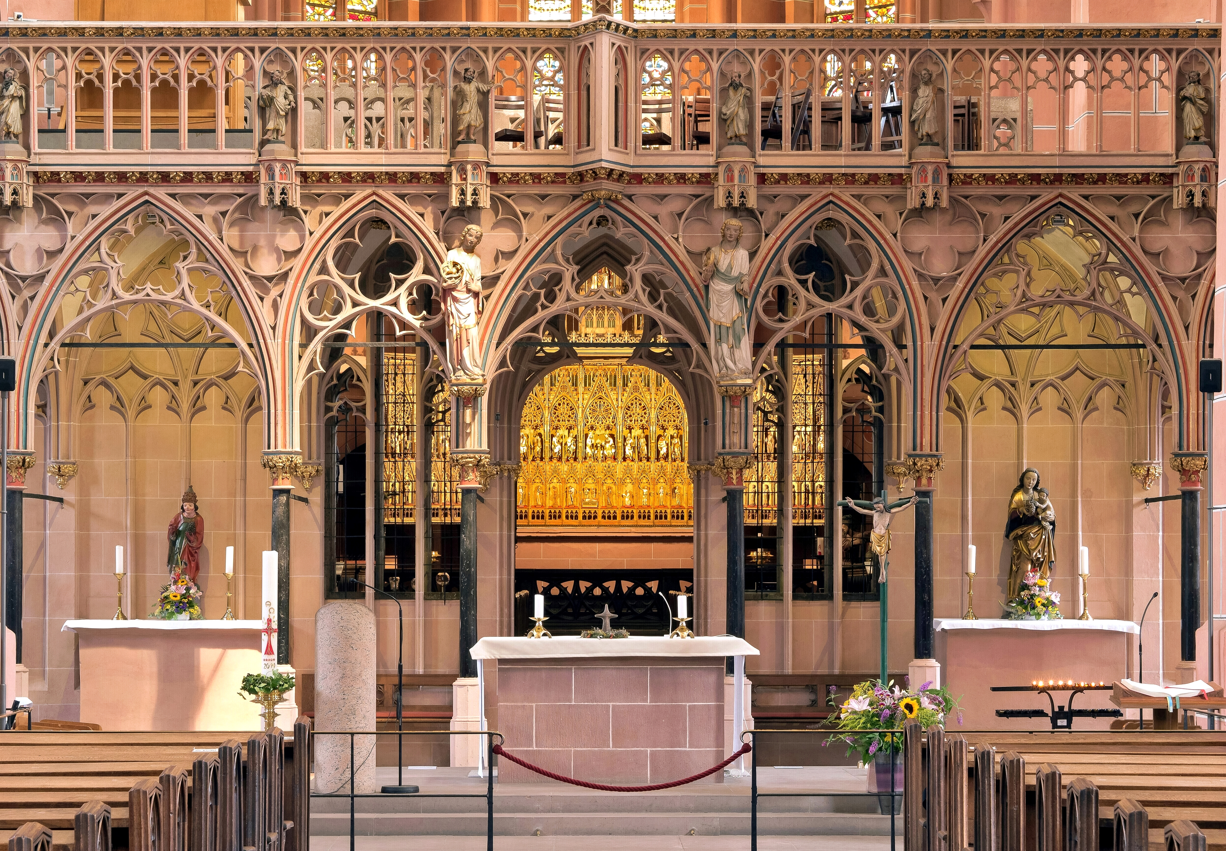 Der Lettner der Liebfrauenkirche zu Oberwesel trennte den Chorraum, der den Stiftsherren vorbehalten war, vom Langhaus der Kirche, in dem die Laien bleiben mussten. Der Chorraum schließt mit dem Goldaltar ab. Vor dem Lettner steht der Gemeindealtar aus den 1960er Jahren.